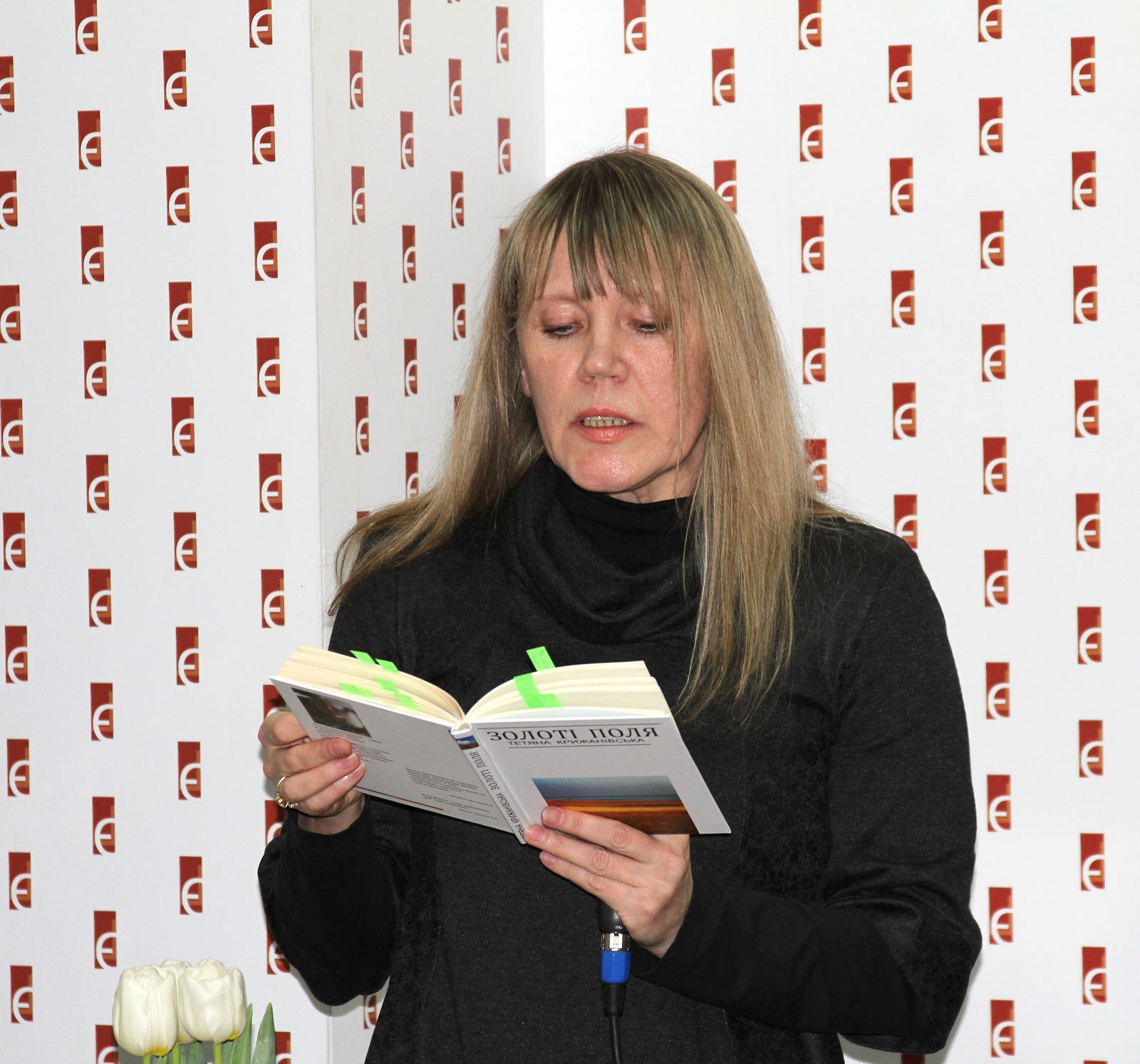 Тетяна Іванівна Крижанівська - українська поетеса, прозаїк.